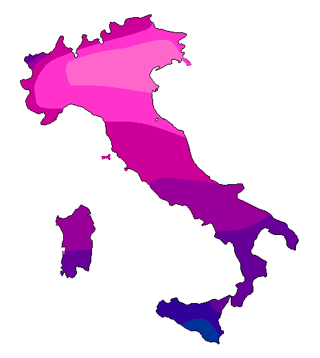 Carta della radiazione solare globale in Italia in novembre 10 MJ/mq